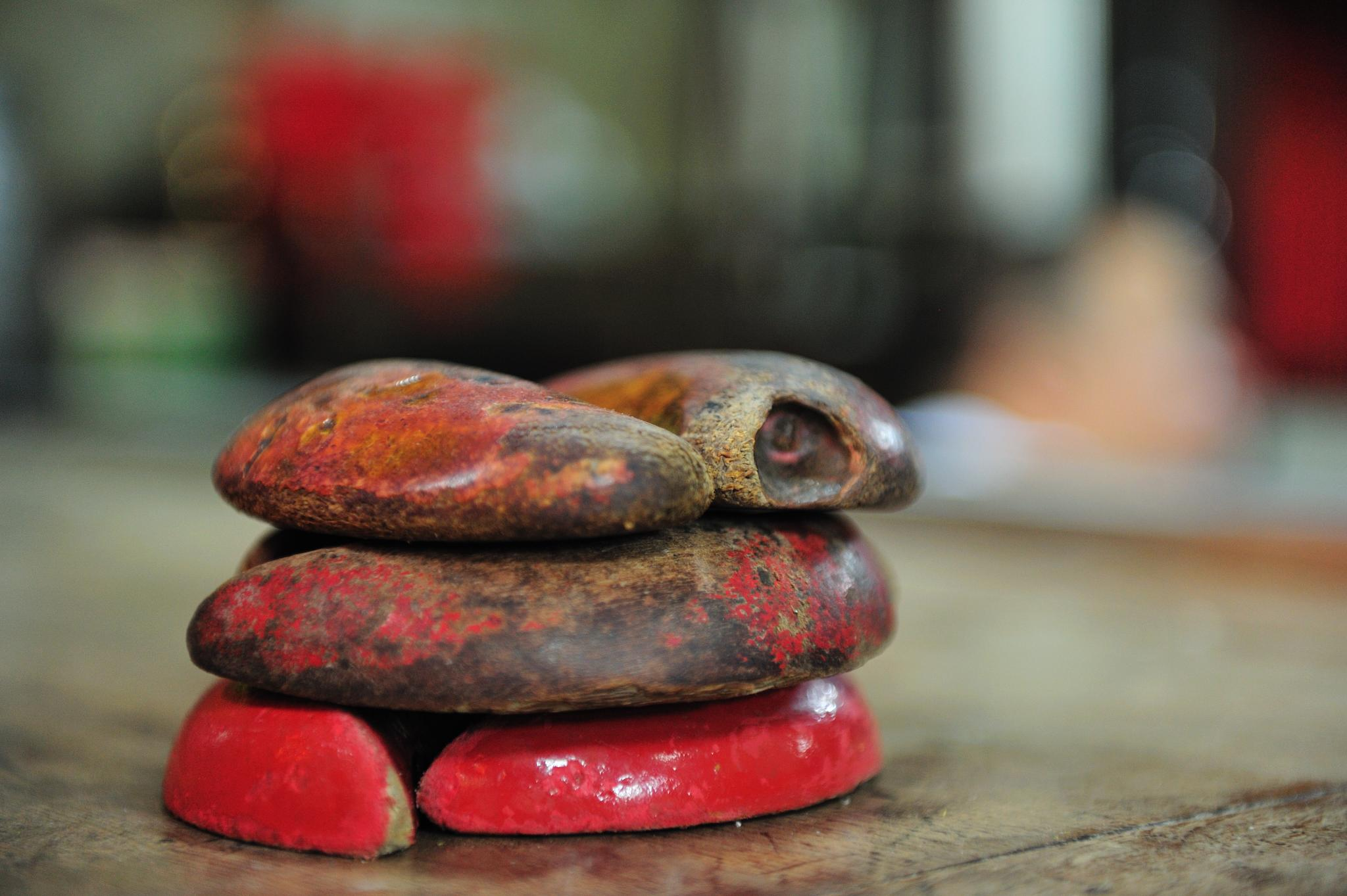 頗有歲月的筊杯 不知以成全了多少信眾的心願 與抱負 Set of jiaobei